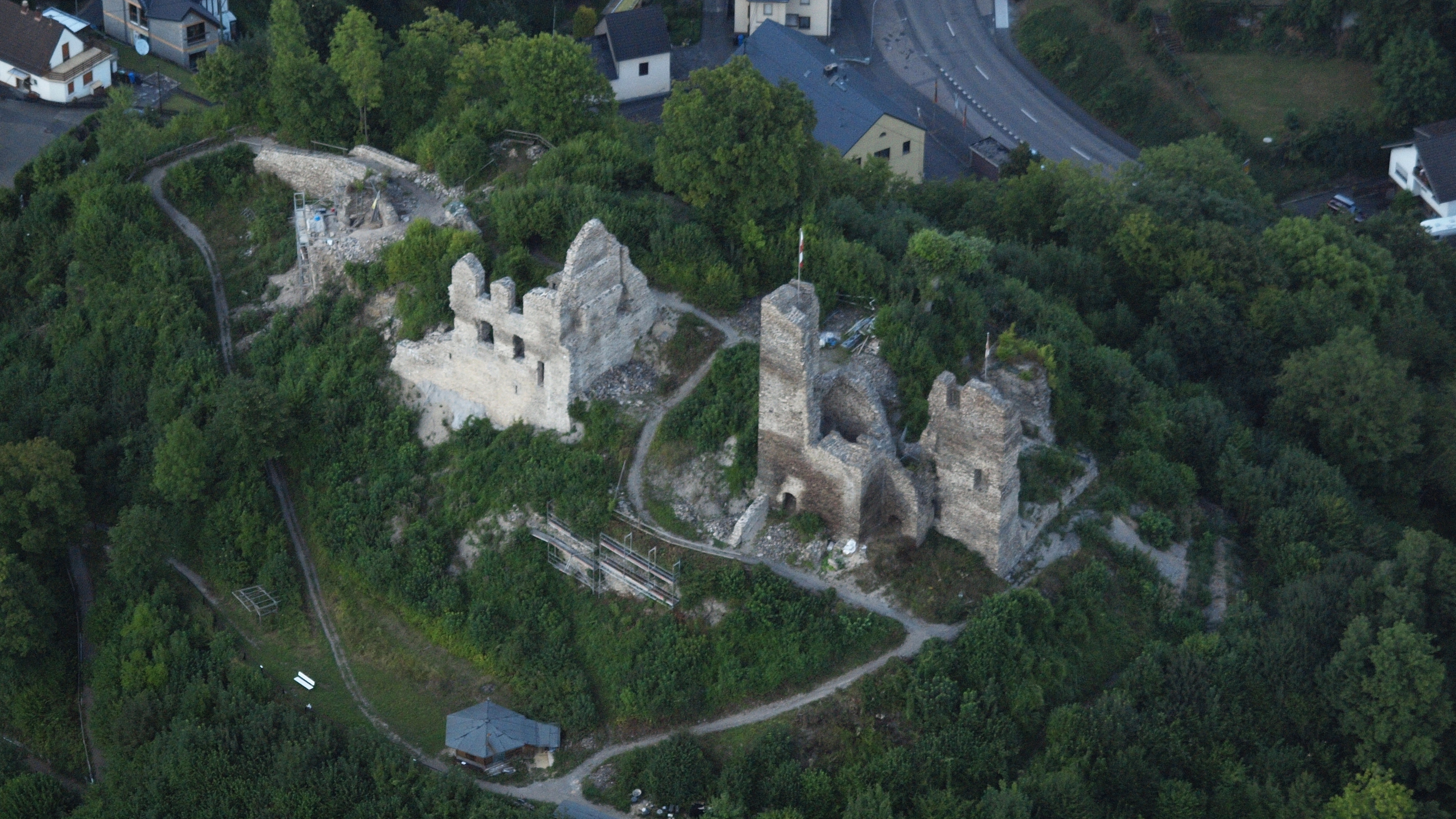 Burg Isenburg: Luftaufnahme